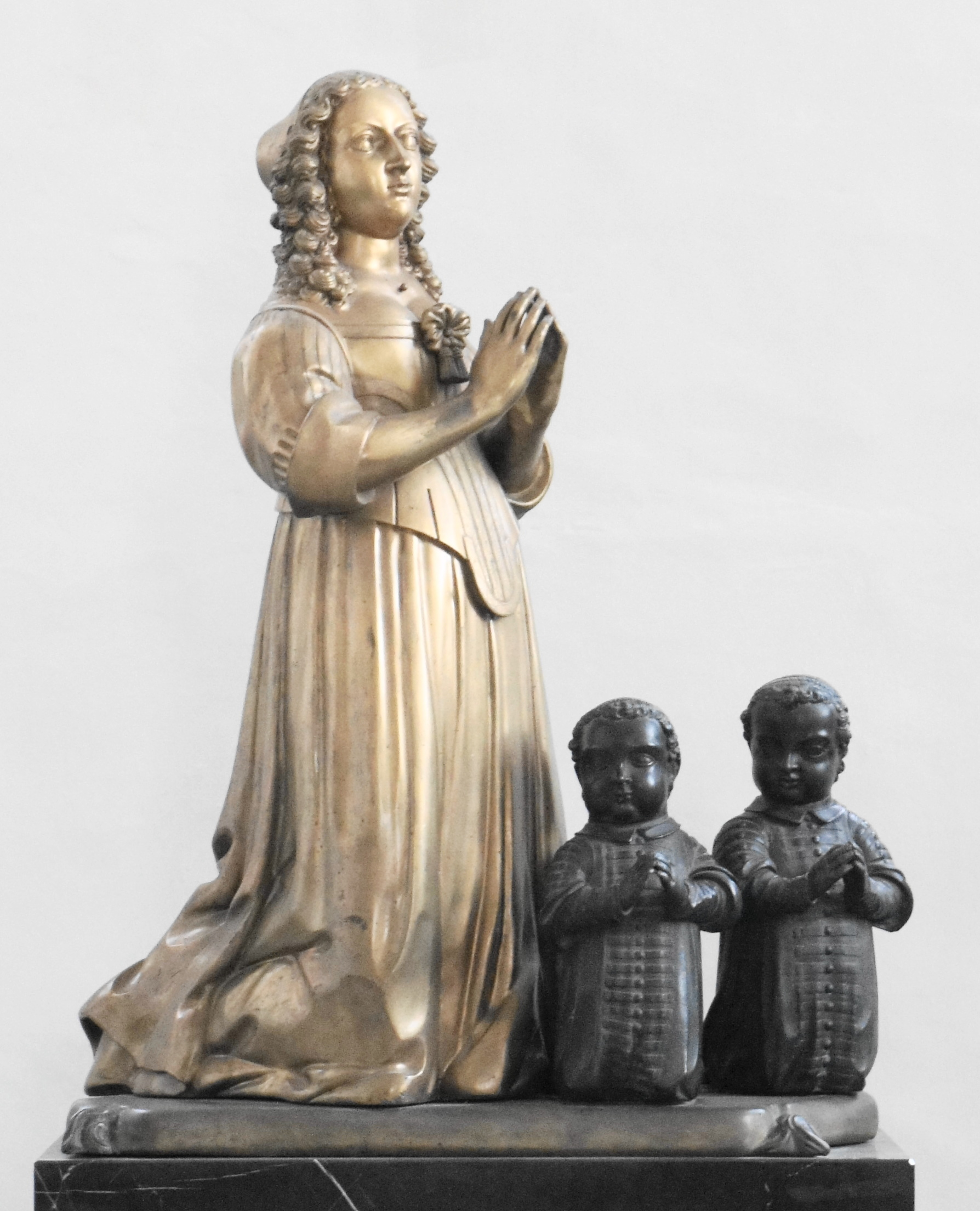 Im Dom zu Freiberg: Figuren der Herzogin Sophie Hedwig (1630–1652; 1650 ∞ Prinz Moritz) und ihrer beiden Söhne Moritz und Johann Philipp, ursprünglich Bestandteile des Epitaphs der Herzogin an der Nordwand des Chores der Dresdner Sophienkirche.